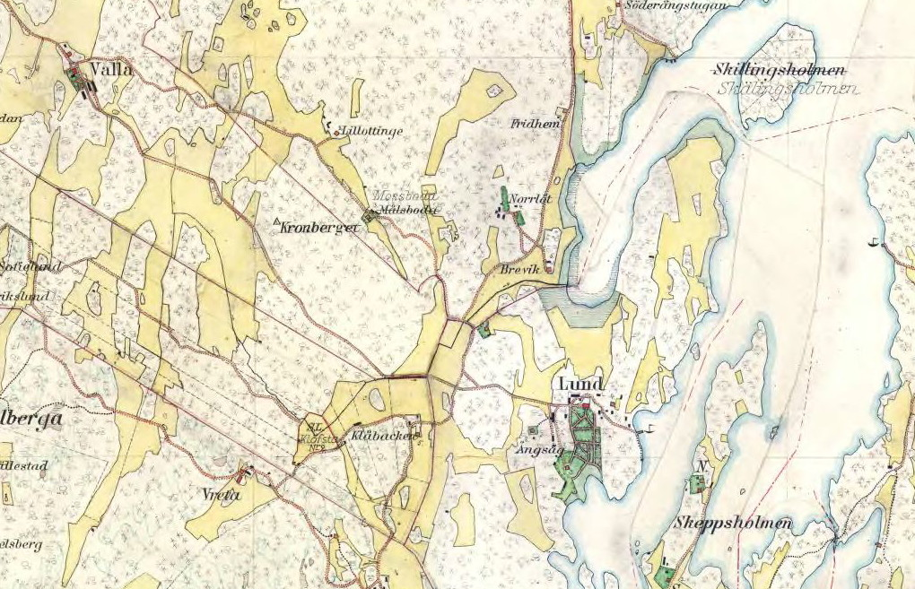 Gårdarna Lund och Valla på Häradsekonomiska kartan